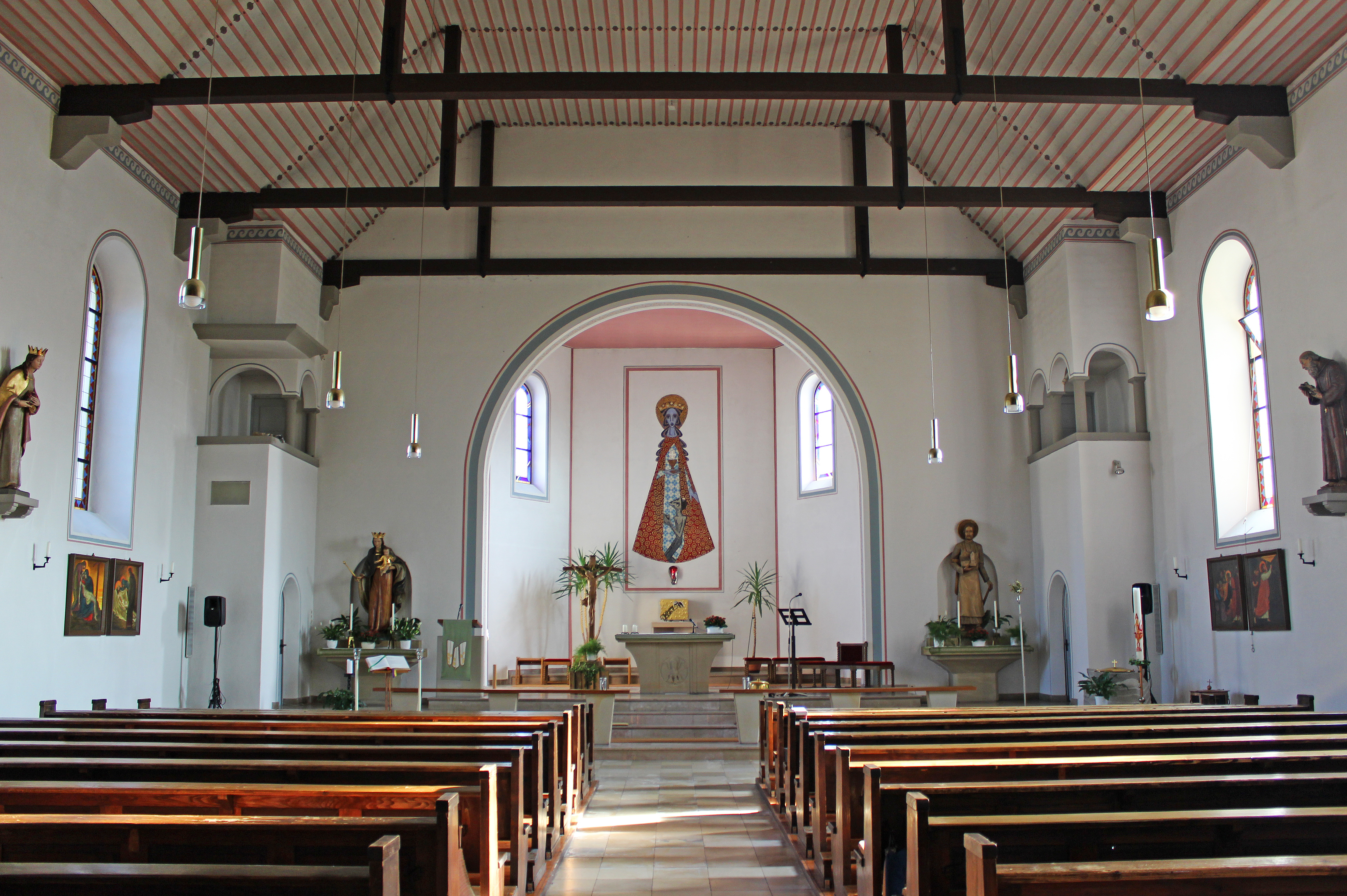 Blick ins Innere der katholischen Pfarrkirche St. Barbara in Blickweiler, einem Stadtteil von Blieskastel, Saarpfalz-Kreis, Saarland